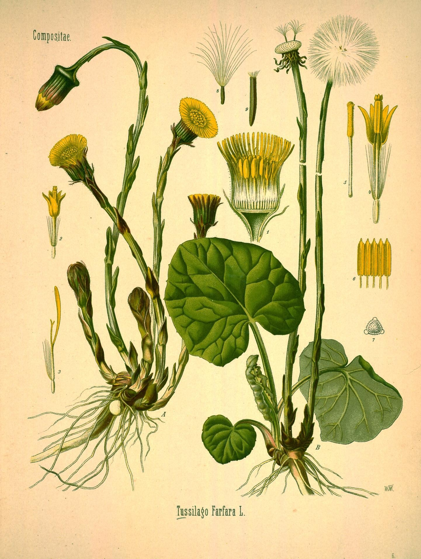 Huflattich. A blühende Pflanze, natürl. Grösse; B fruchtende Pflanze, desgl.; 1 Blüthenkopf im Längsschnitt, desgl.; 2 Blume der Scheibe, vergrössert; 3 Randblume, desgl.; 4 Scheibenblume im Längsschnitt, desgl.; 5 Griffel, desgl.; 6 Staubbeutelrohr, gespalten und ausgebreitet, desgl.; 7 Pollenkorn, desgl.; 8 Frucht mit Krone, desgl.; 9 dieselbe ohne Krone, stärker vergrössert.